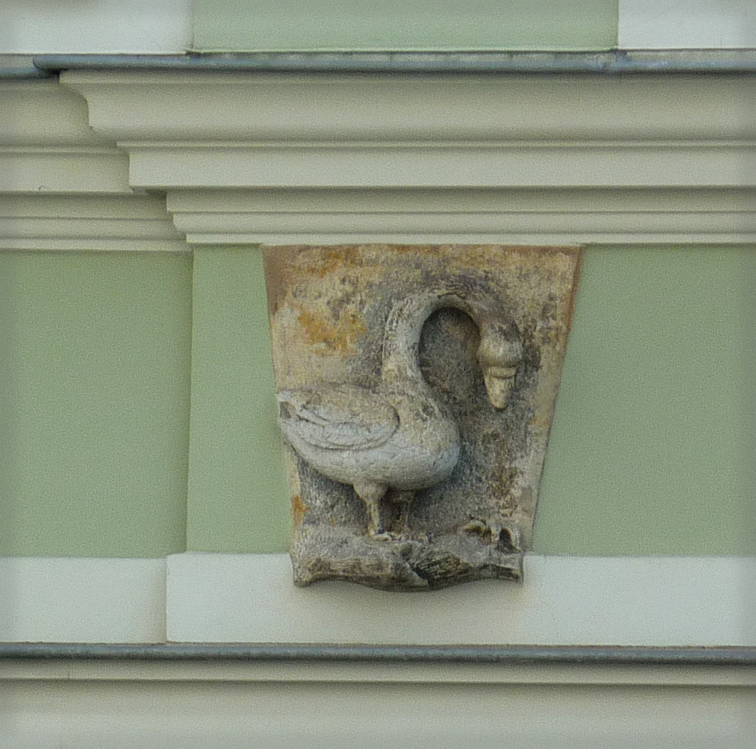 Steinwappen am "Haus zum Schwan" am Neumarkt in Dresden